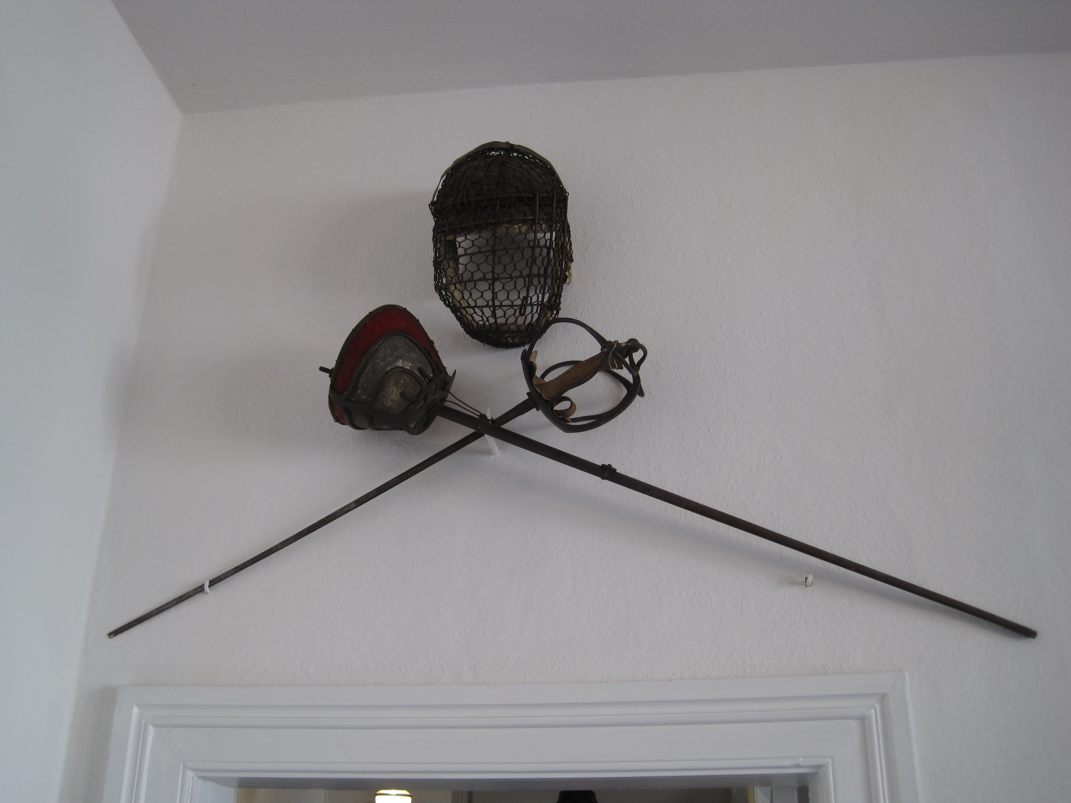 Mensurschläger (mit Paukschläger und Paukhelm) in den Farben des Corps Hannovera Göttingen im Bismarck-Museum in Friedrichsruh